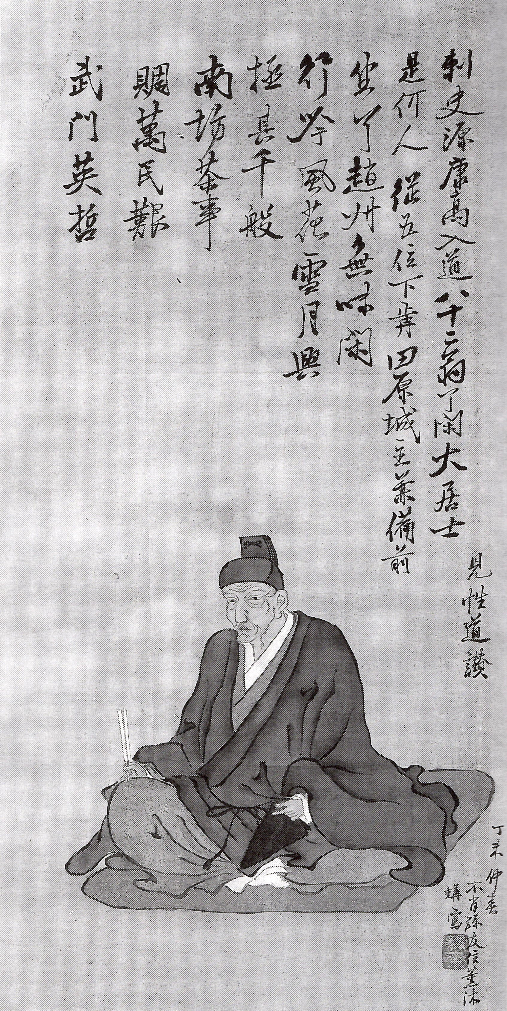 三宅康高の肖像。